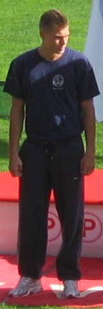 Eemeli Salomäki Kalevan kisoissa, Ratinan stadionilla, Tampereella, 26. heinäkuuta 2008